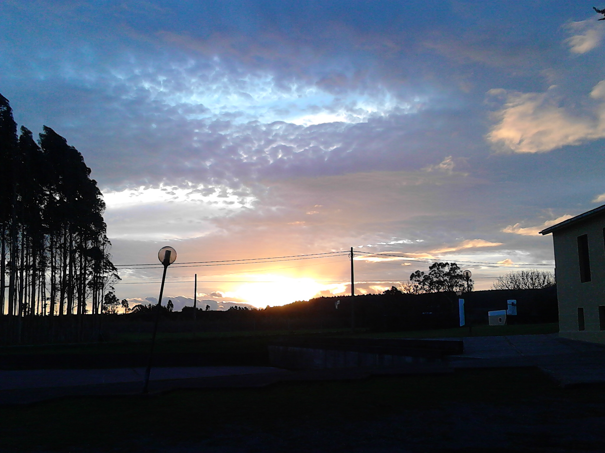 Abrente dende a Granxa Escola Pedro Murias de Ribadeo